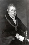 Franz Paul von Mittermayr (1766-1836) andere Versionen: ...